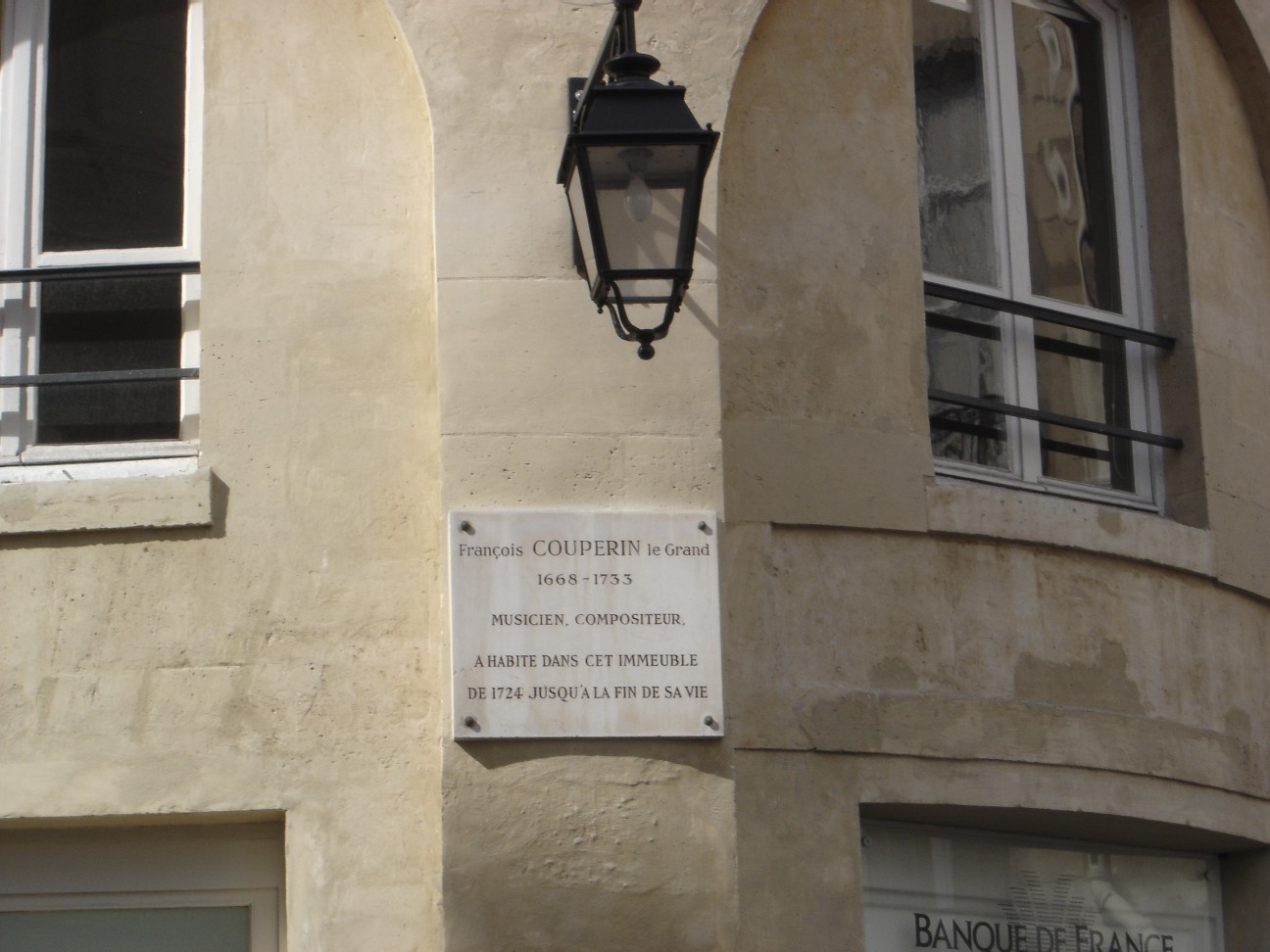 Immeuble ou vécut François Couperin - Rue Radziwill - Paris, Ier arrondissement